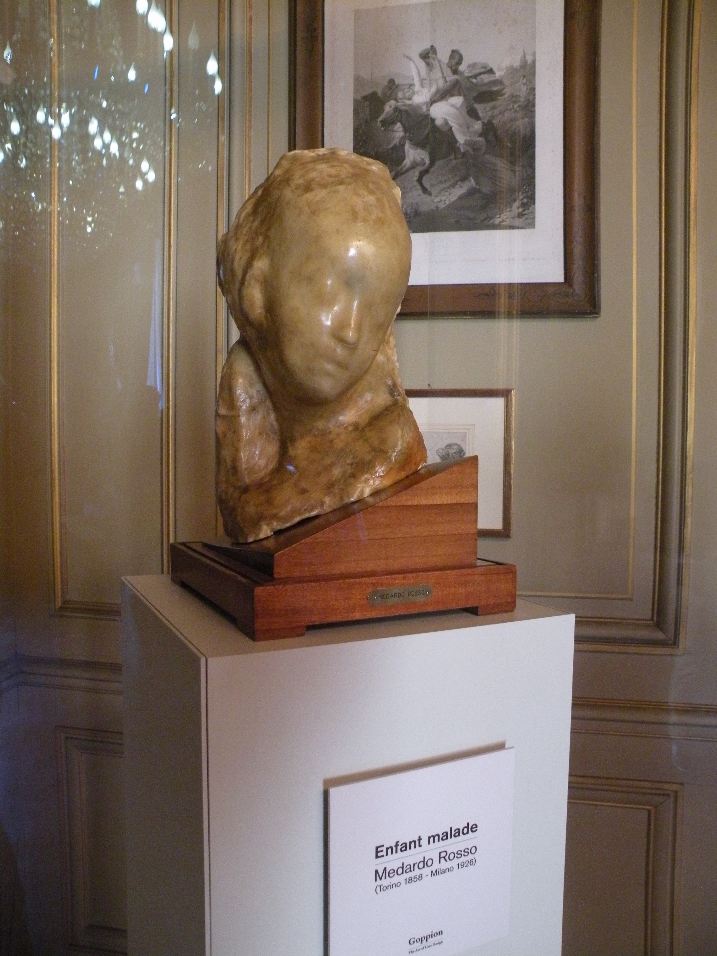 enfant malade de Medardo Rosso Hôtel de la Rochefoucauld-Doudeauville